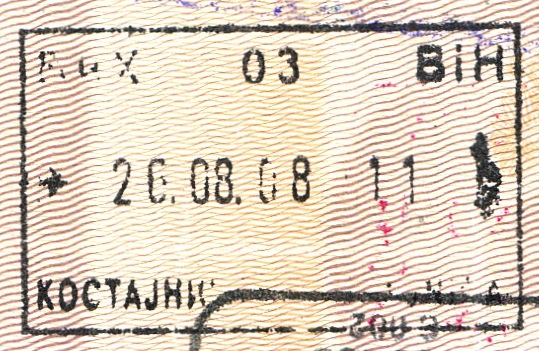 Passport stamp from Kostajnica, 2008 (with Hravatska Kostajnica).